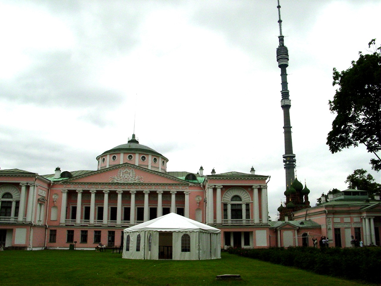 Дворец в Останкино, телебашня и уличный шатер